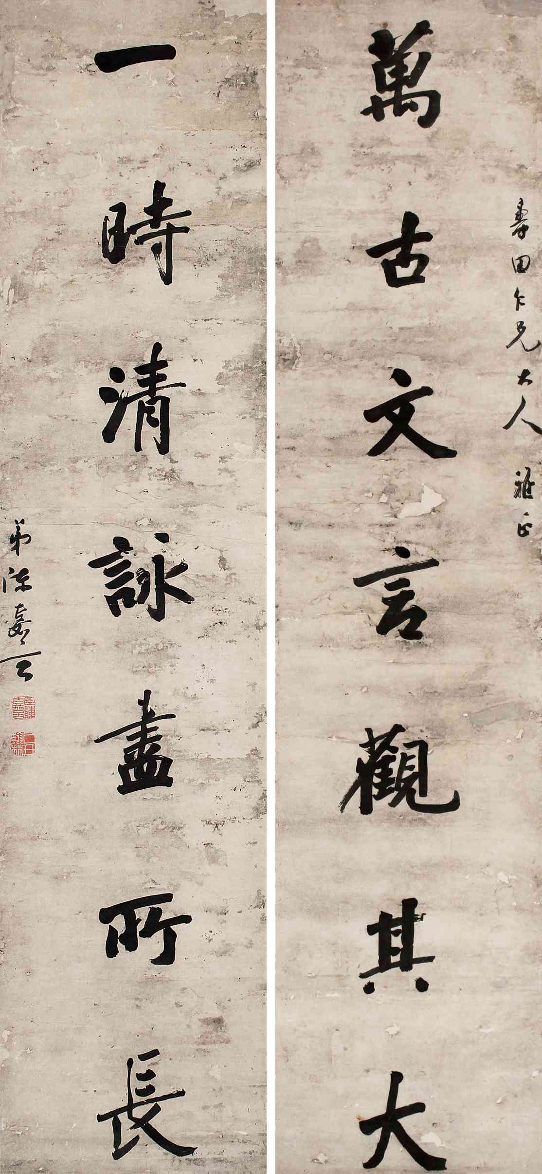 中文（香港）: 陳嘉言（1851—1934）書法